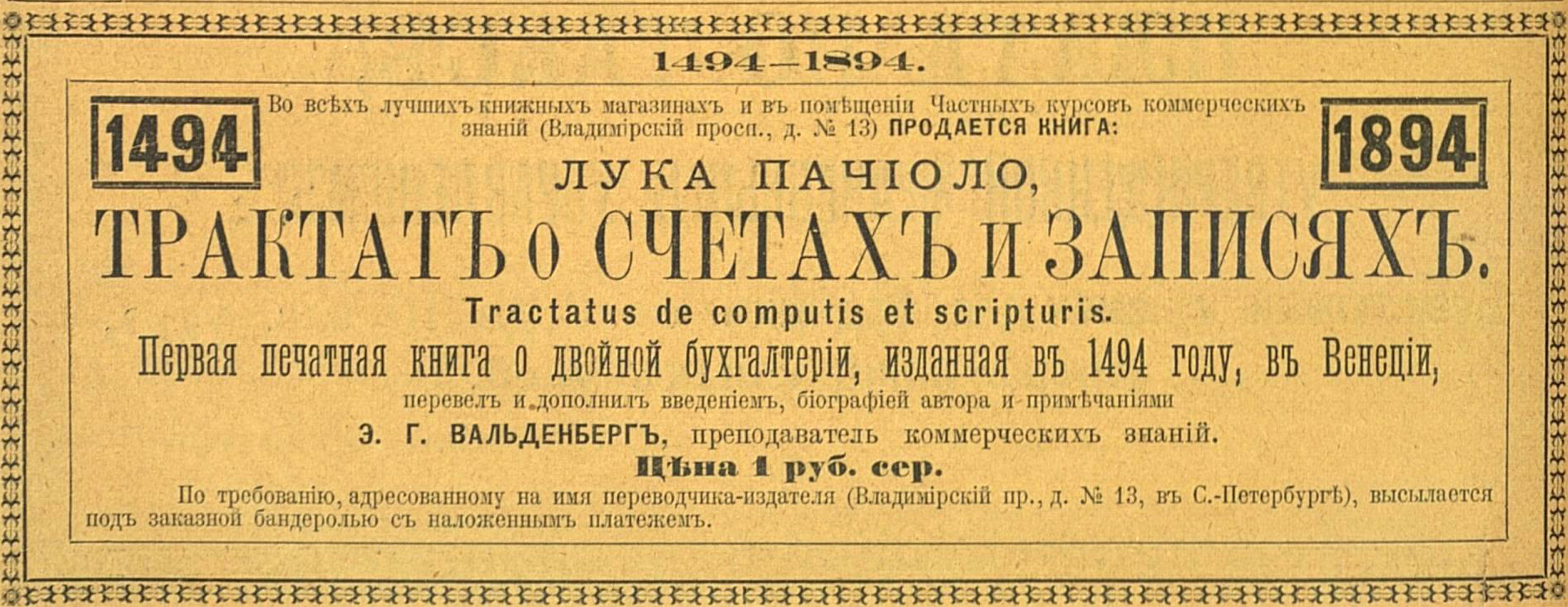 Реклама книги Пачоли, 1894 год.